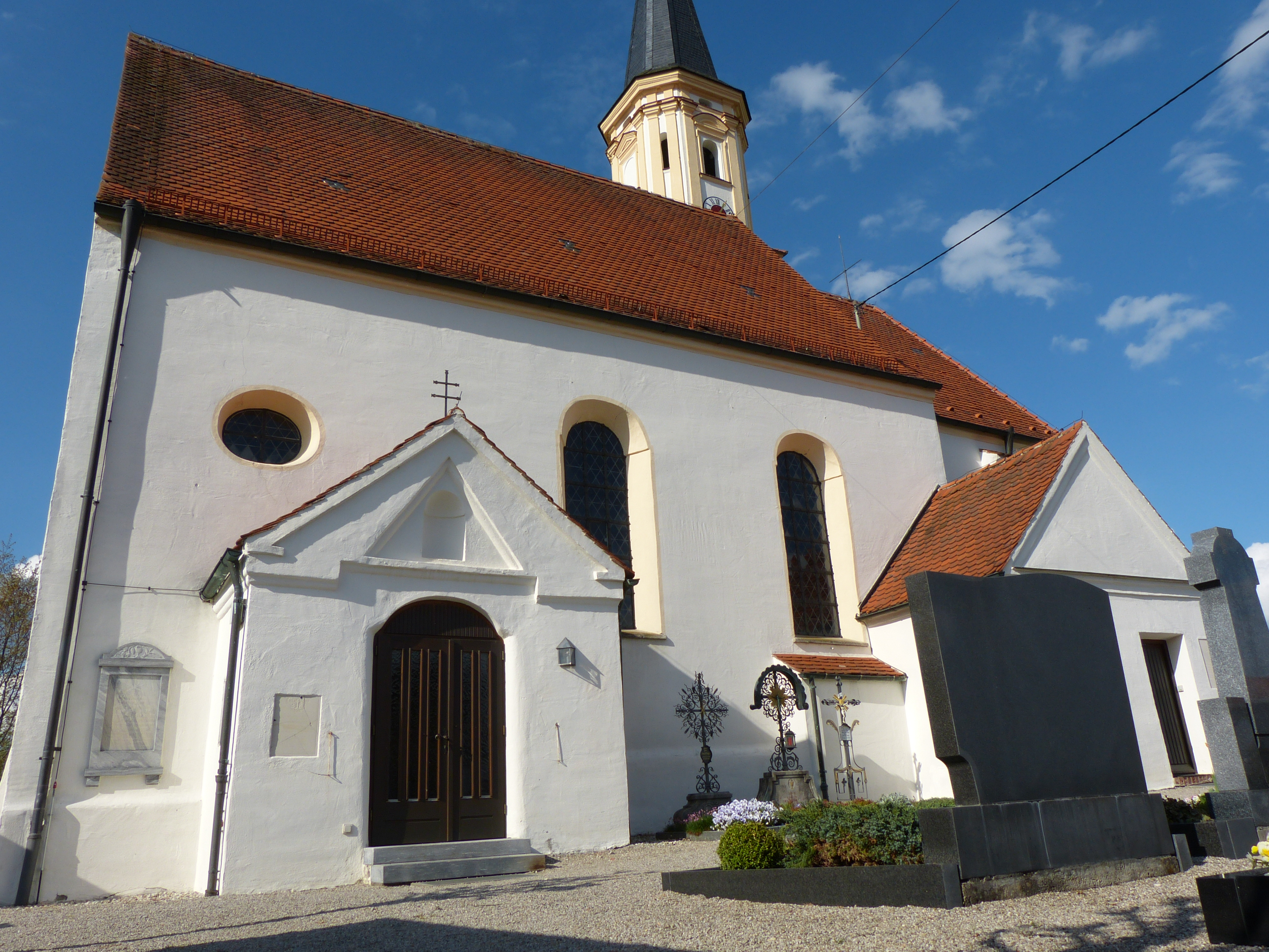 St. Johannes Baptista im Ortsteil Könghausen, Eppishausen, Landkreis Unterallgäu, Bayern